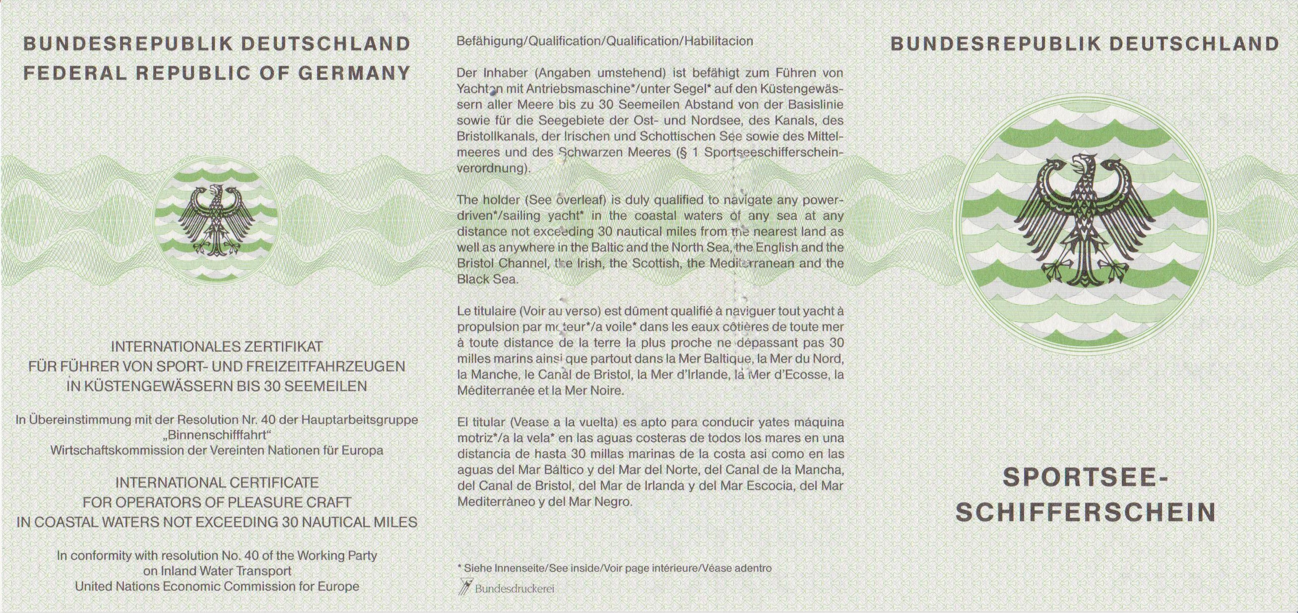 Sportseeschifferschein